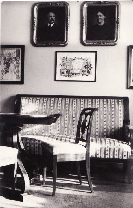 Nábytek Atanáše Kopeckého a dvě daguerrotypie – vpravo vyobrazená Karolína Kopecká, roz. Voglová a vlevo je vyobrazen Atanáš Kopecký. Fotografie vznikla v 60. letech 20. stol. v Hradci Králové.